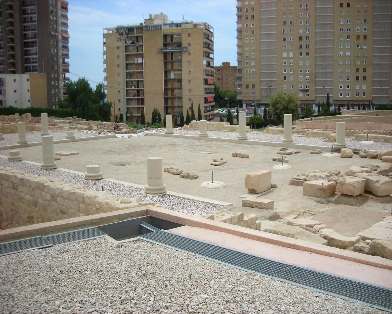 Foro de Lucentum